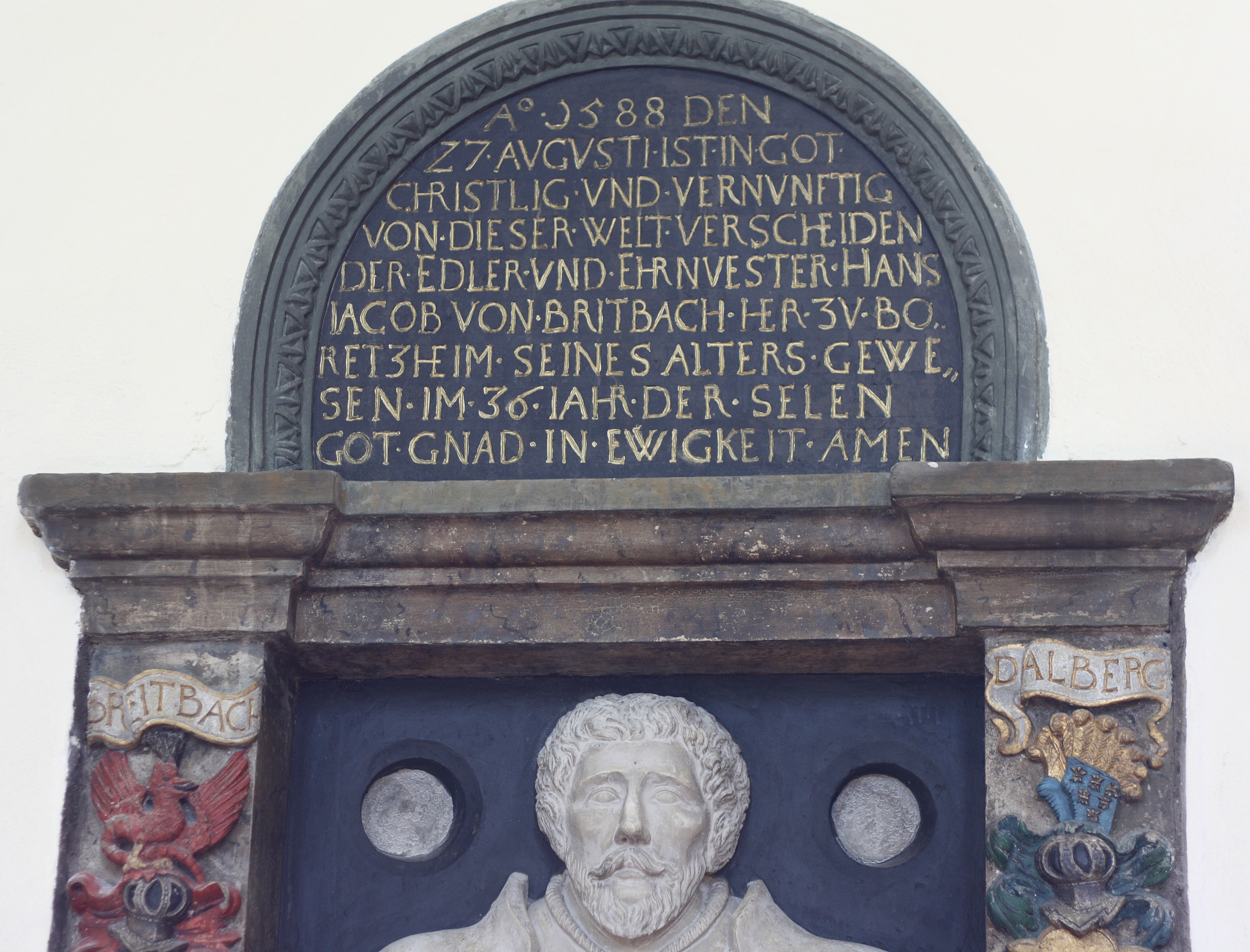 Grabplatte in der katholischen Pfarrkirche St. Johannes Baptist in Sankt Johann von Hans Jakob von Breidbach (gest. 27. August 1588)